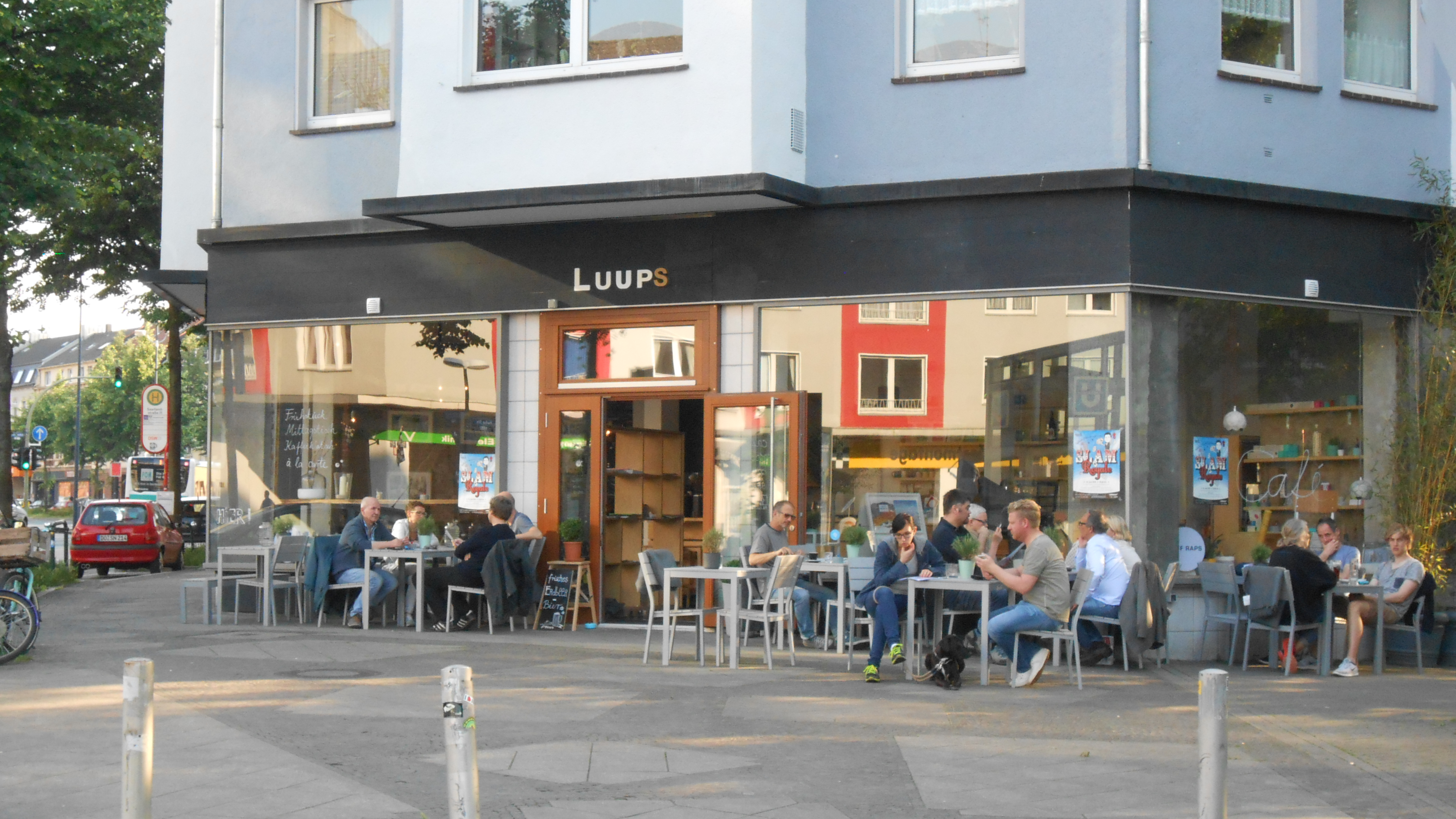 Das Café Luups an der Hohen Straße / Ecke Neuer Graben.